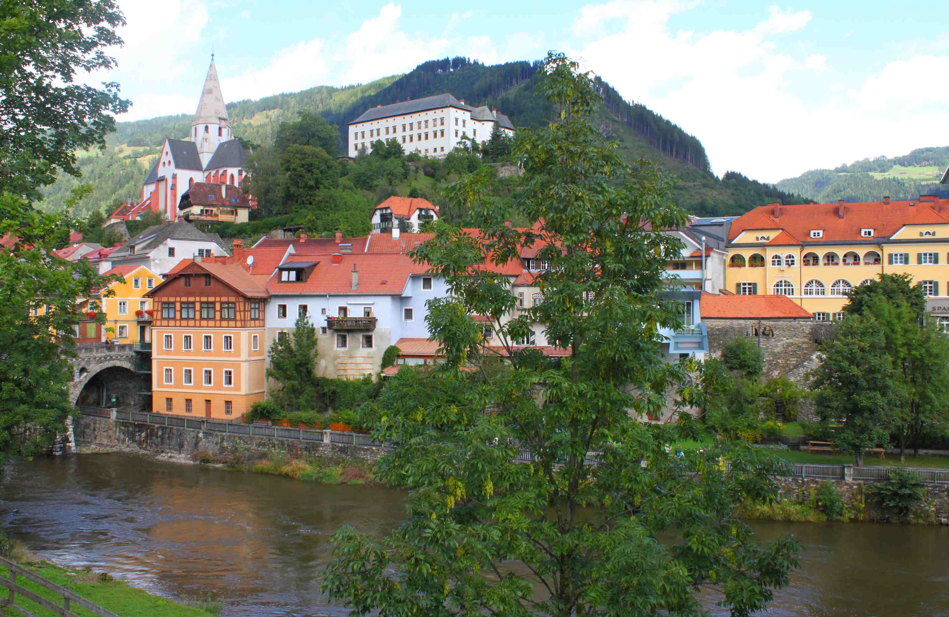 Blick auf Murau über die Mur vom Bahnhof aus, Bahnhofbrücke, Kirche hl. Matthäus und Schloss Obermurau